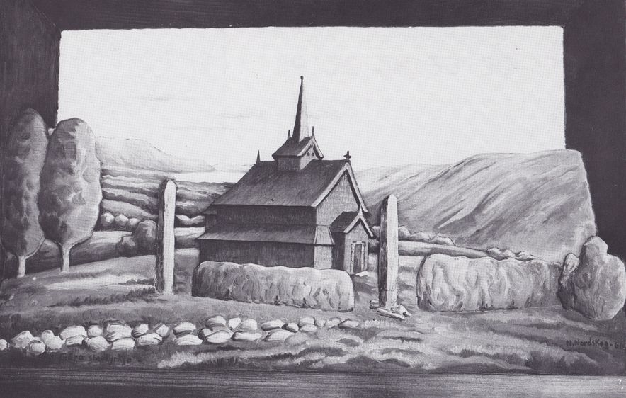 Maleri av Gåra stavkirke. Fotograf: Nordvald Nordskog. Det er steinhella og bautasteinen til høyre i maleriet som fortsatt står